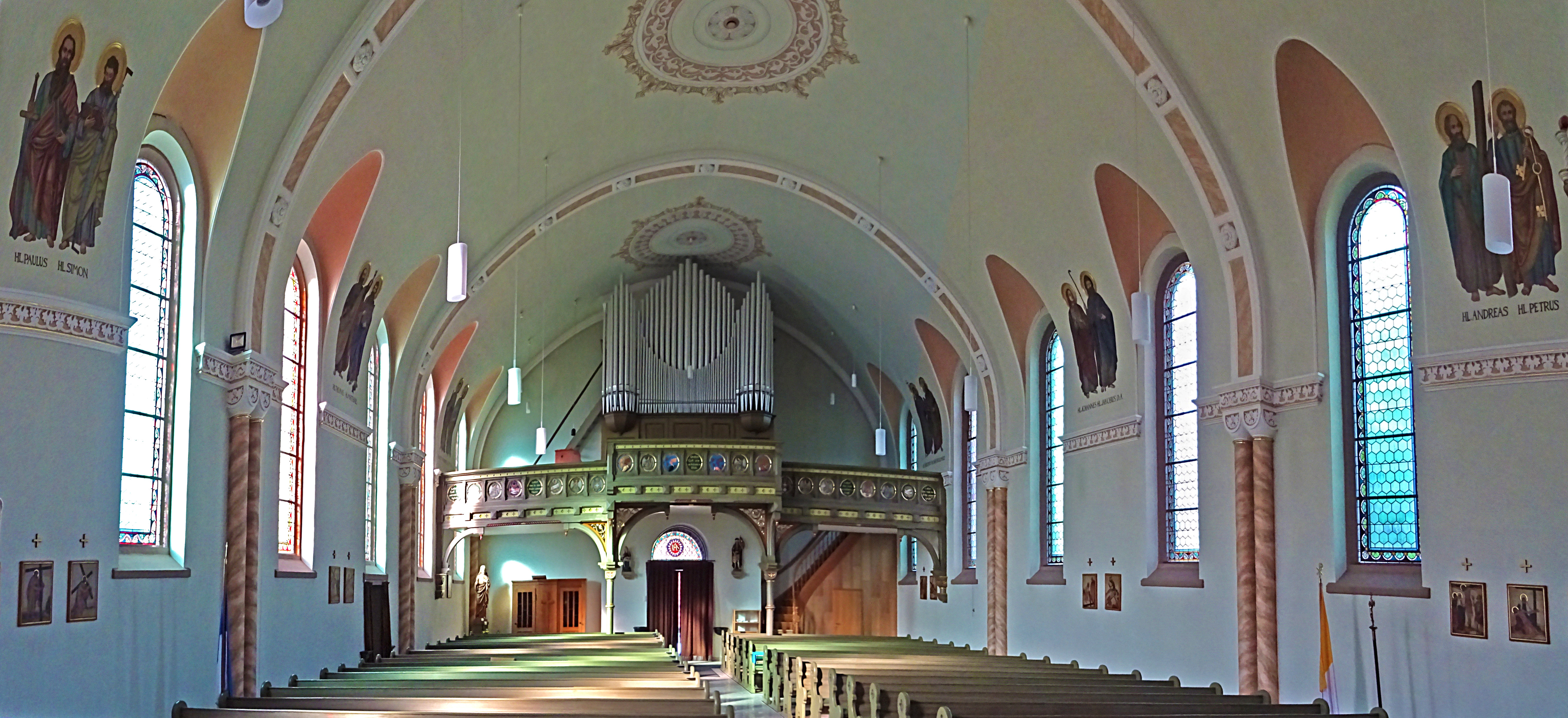 Innenraum Panorama der neuromanischen Dorfkirche St. Mauritius in Lutter (Eichsfeld)